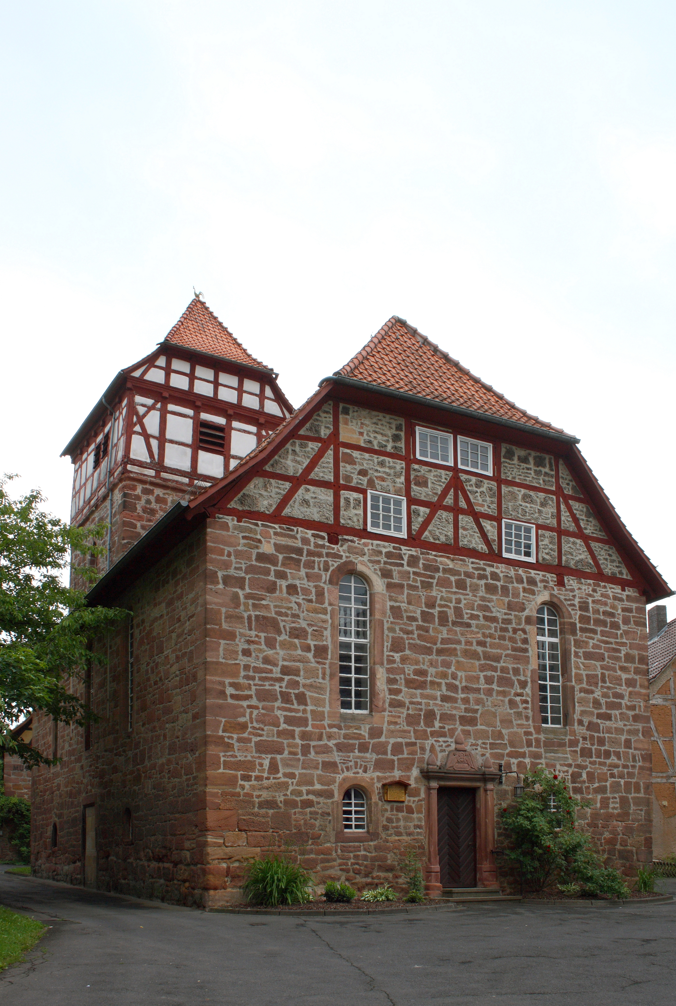 Evangelische Kirche St. Martin in Wichmannshausen, einem Stadtteil von Sontra im Werra-Meißner-Kreis (Hessen)